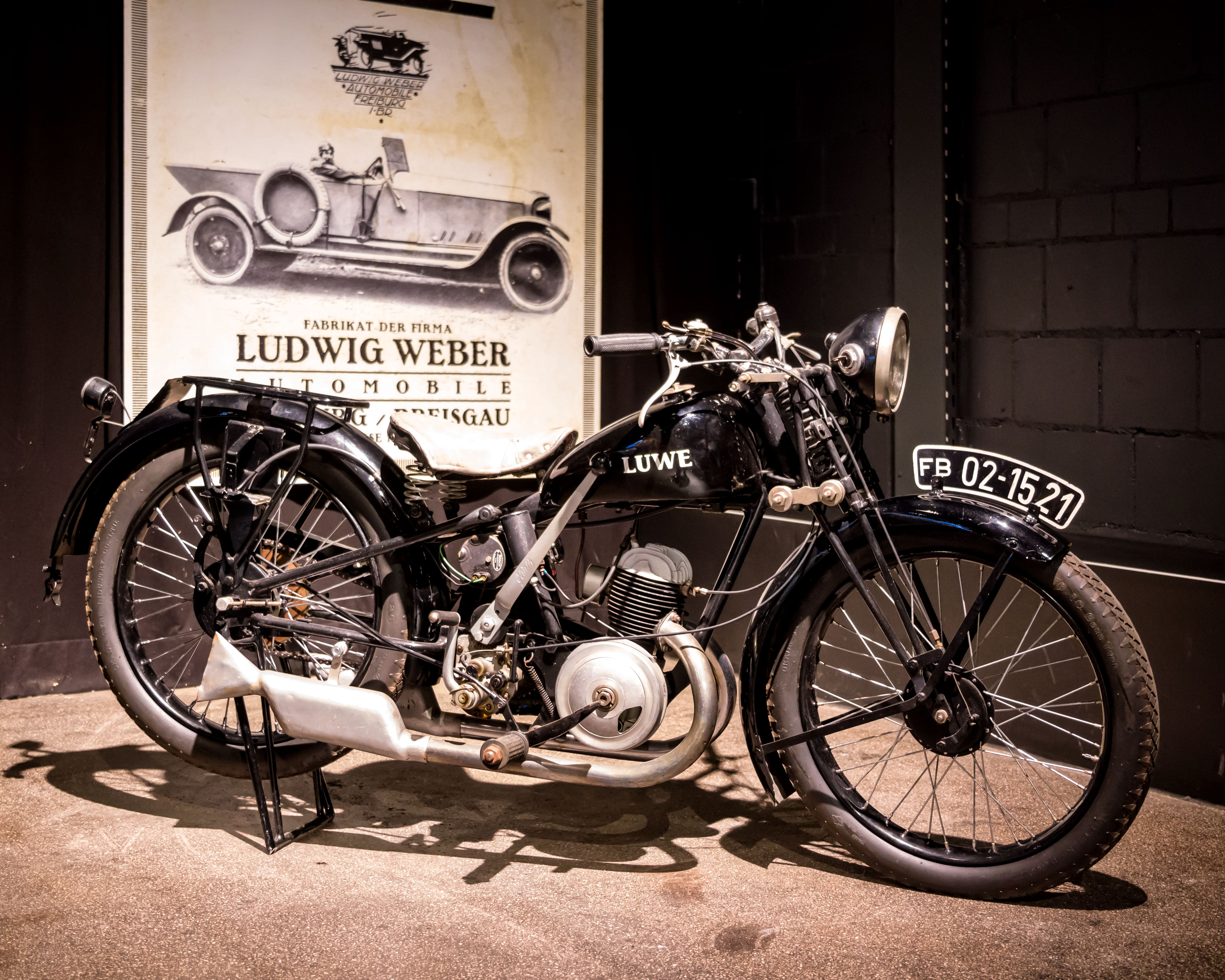 Ein LUWE Motorrad aus dem Jahre 1931, das im Oldtimer Museum Volante in Kirchzarten ausgestellt ist.. Es ist eins der späteren Modelle, die bei der Firma Wunderle in Kirchzarten montiert wurden.